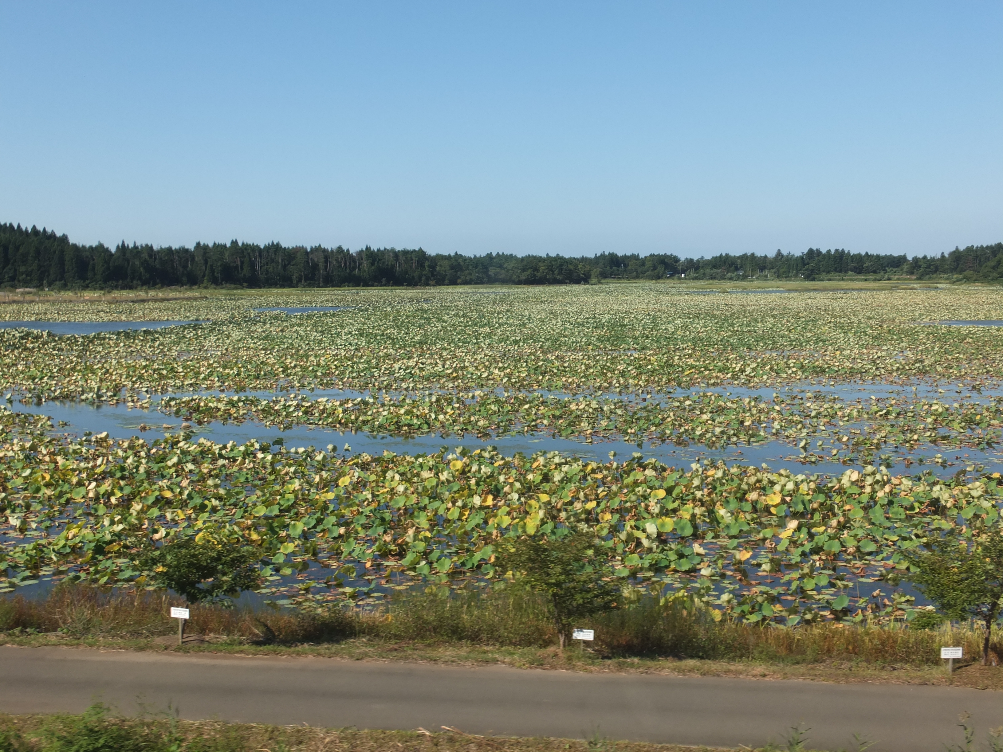 秋田県山本郡三種町の沼地。ジュンサイの栽培がおこなわれ、三種町は全国一の生産を誇る。奥羽本線車中より撮影